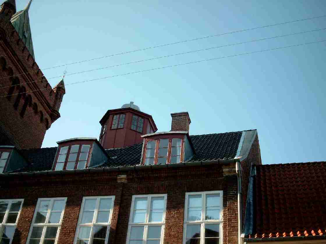 Kikkenborg, Stengade i Helsingør. Eget billede, hermed doneret